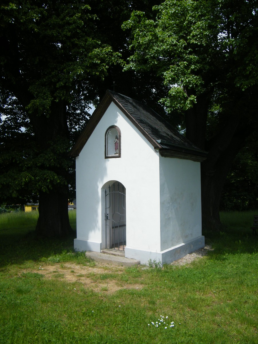 Kaple Nejsvětější Trojice v Království u Šluknova